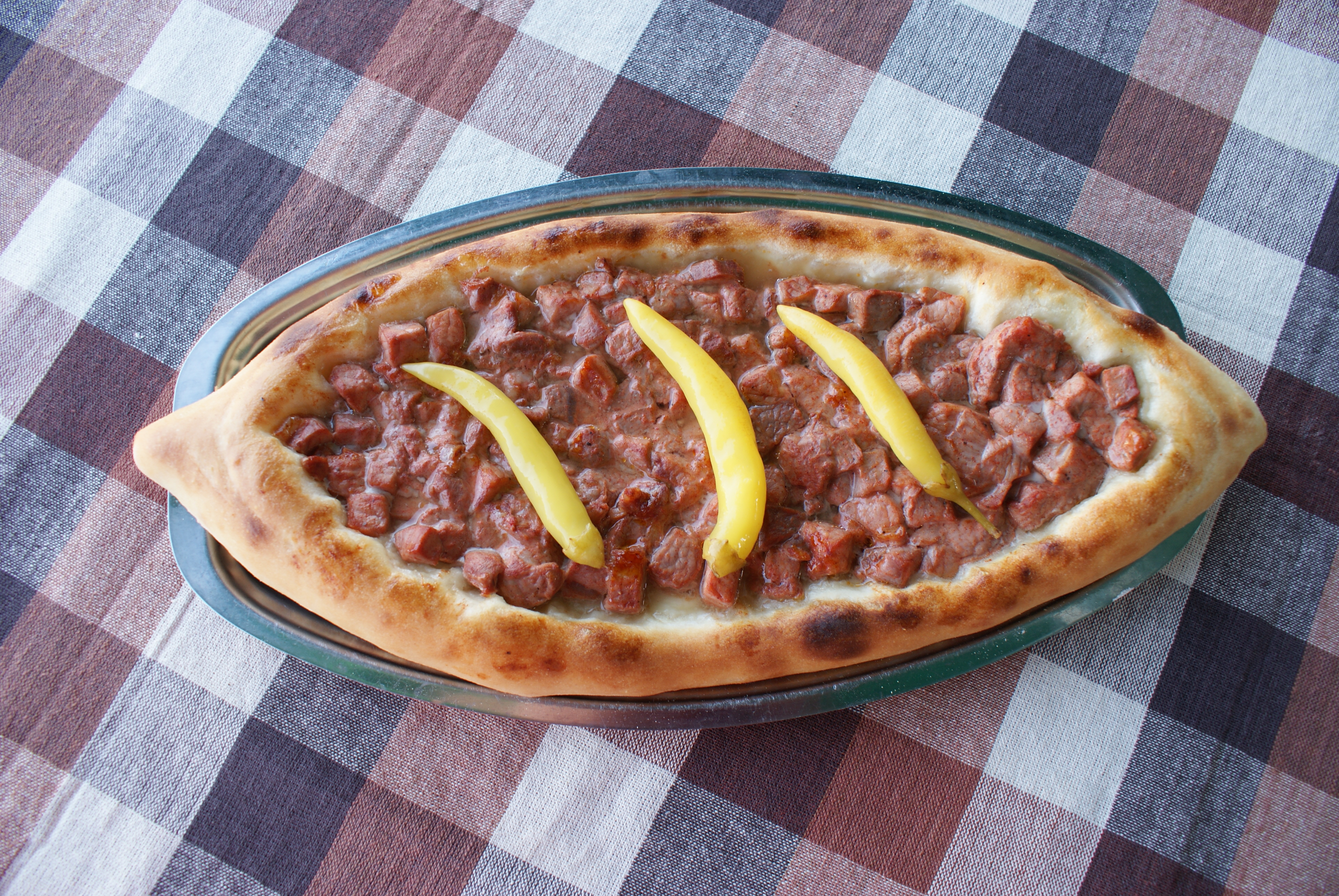 Пастрмалија е македонски специјален вид на пита направен од тесто и месо. Традиционалната пастрмалија има долгнавеста форма со сецкано месо врз неа. Името потекнува од зборот пастрма, што значи солено и сушено месо од овца или јагне.